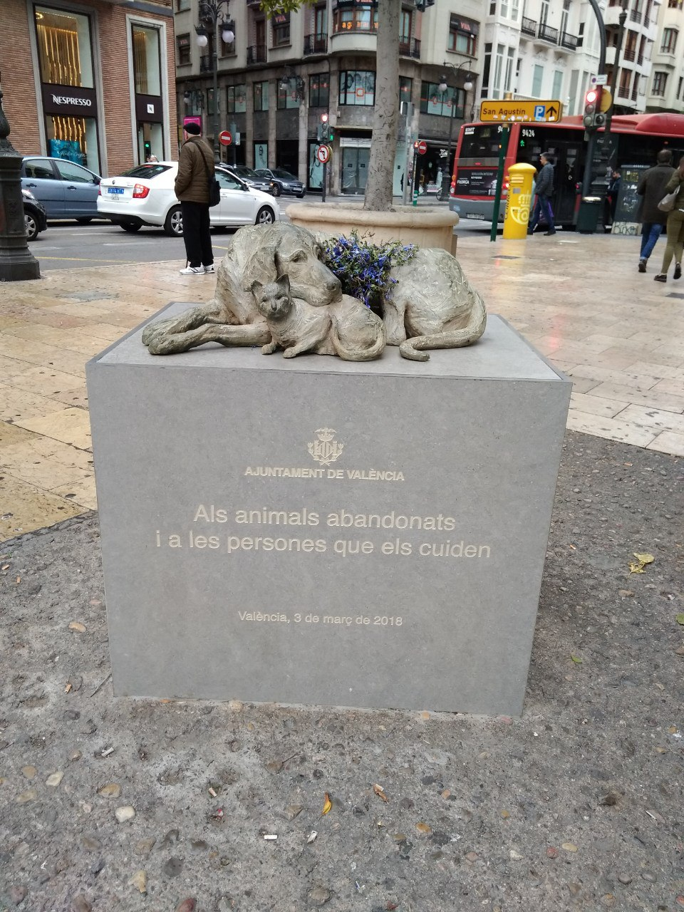 Escultura urbana perro